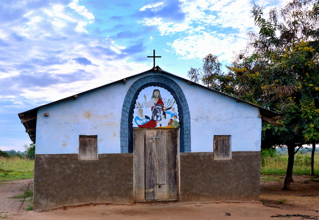 Nr Murchison.